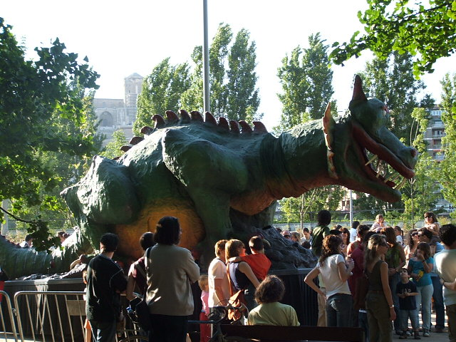 Foto del Marraco de Lleida